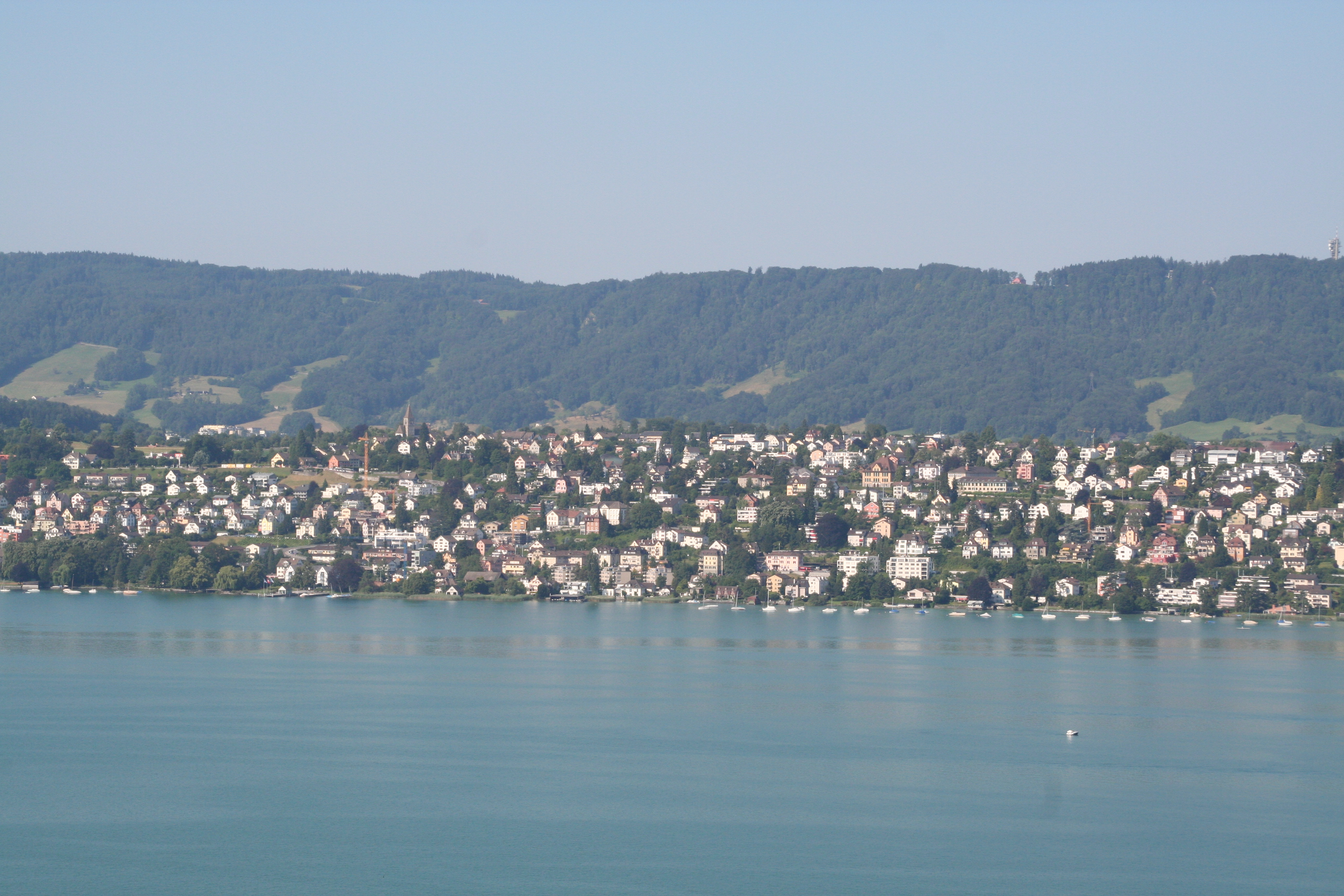 Kilchberg von Zollikon aus gesehen